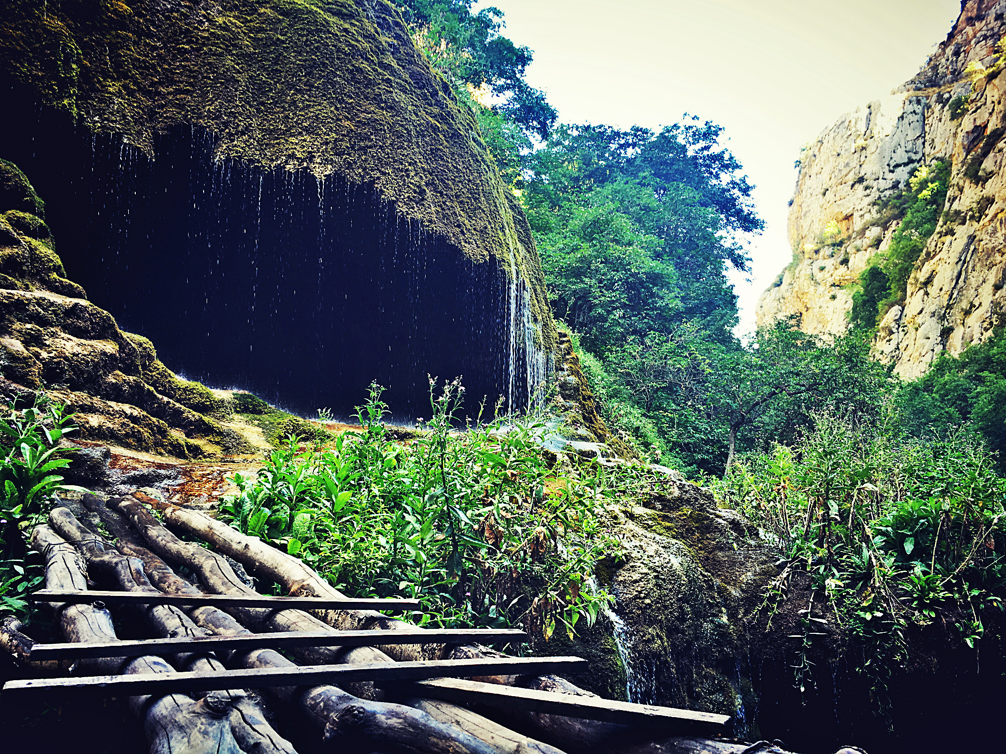 Մամռոտ Քար ջրվեժ